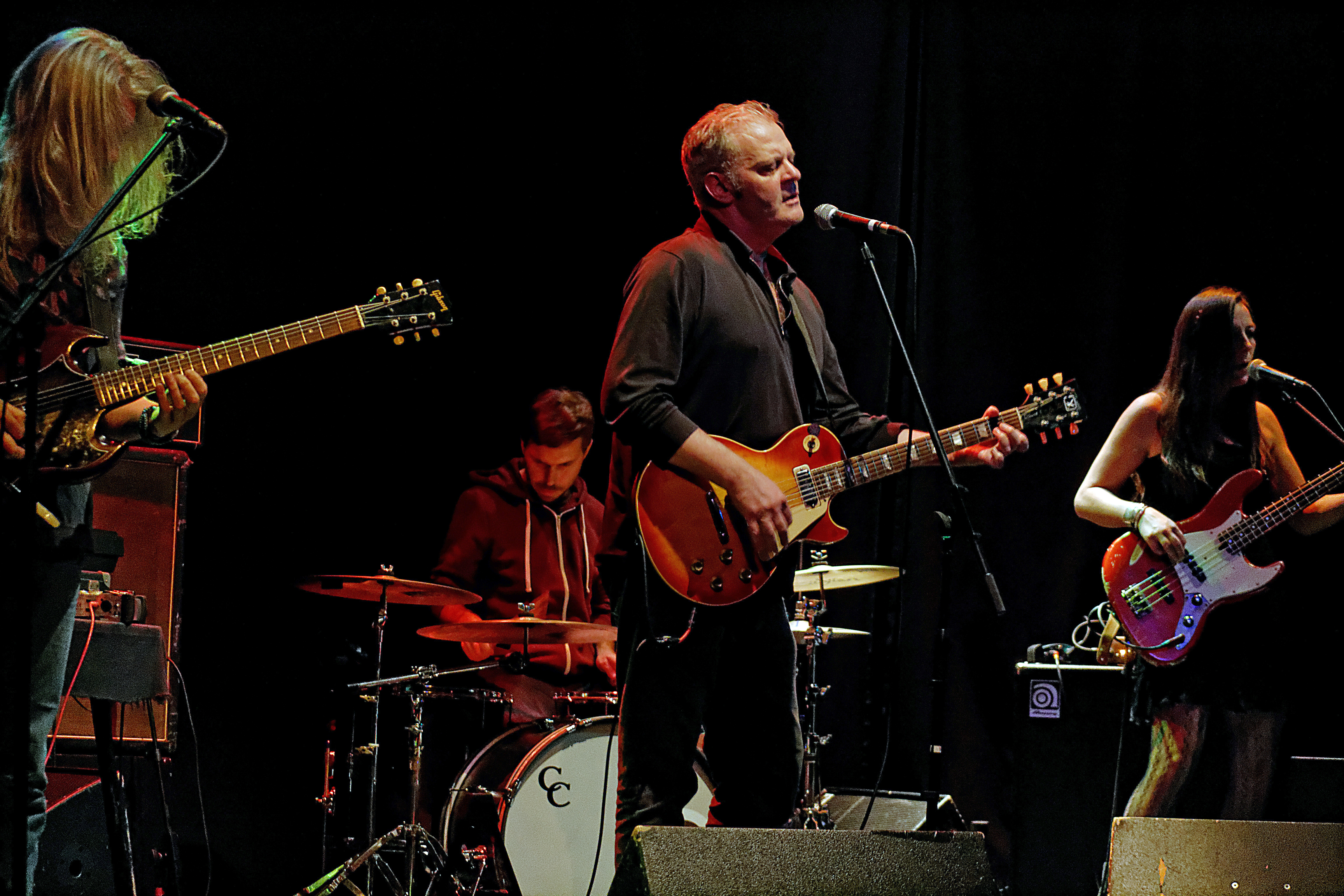 Le groupe Republik de Frank Darcel en showcase à l'occasion de la sortie du premier album le 13 novembre 2015 à la MJC de Morlaix.